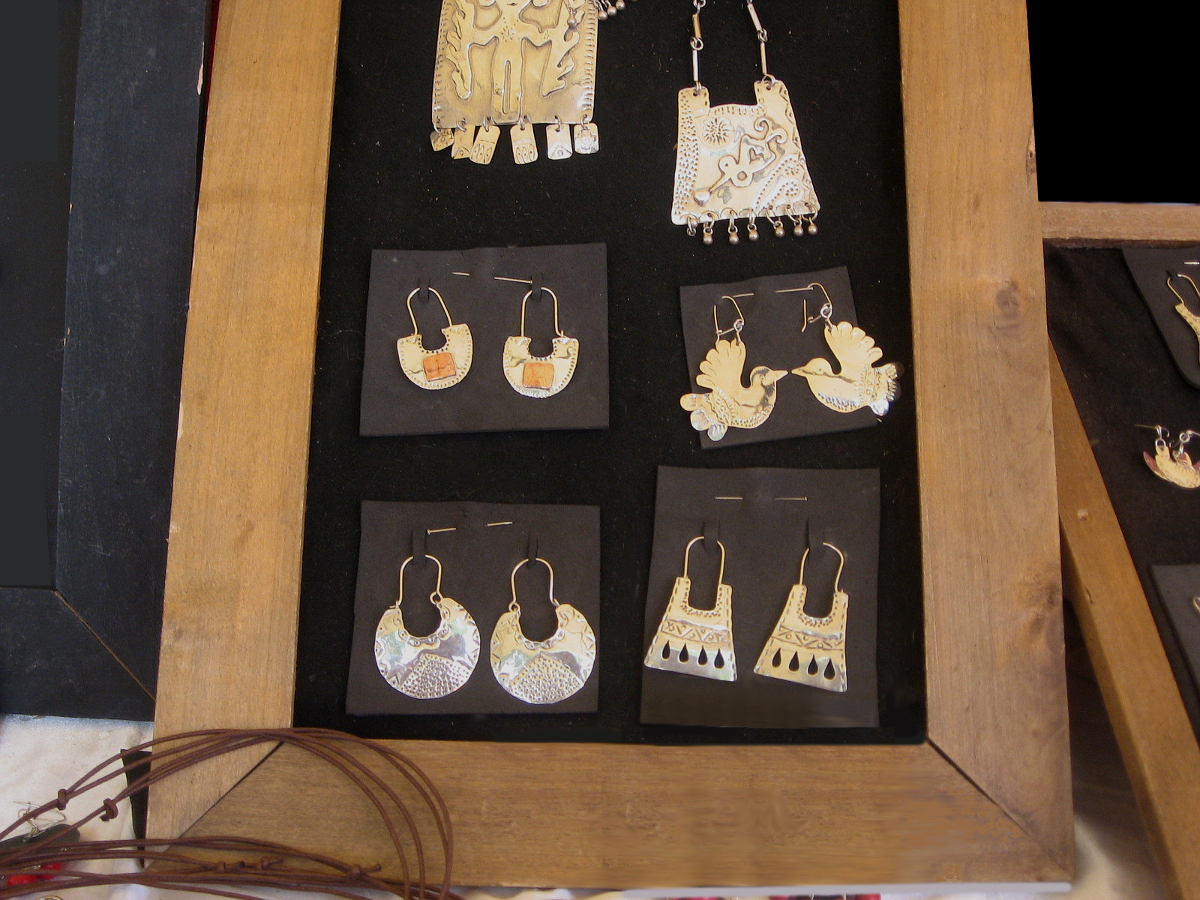 Zarcillos (Chaway) de diseño mapuche en venta en un puesto callejero en Buenos Aires (diciembre de 2017)